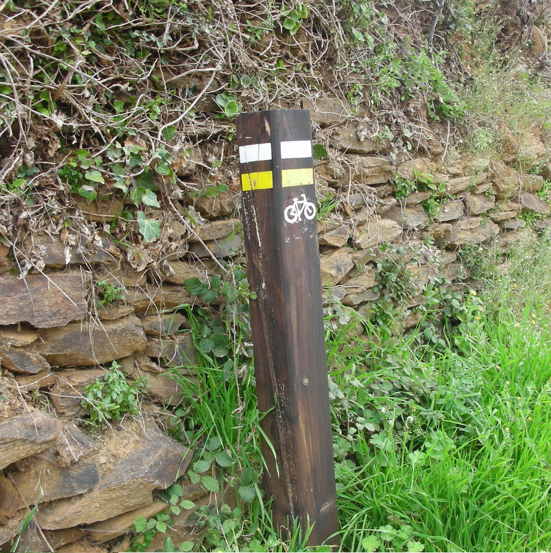 Balisage de sentiers VTT sur la commune de Sotoserrano en Espagne